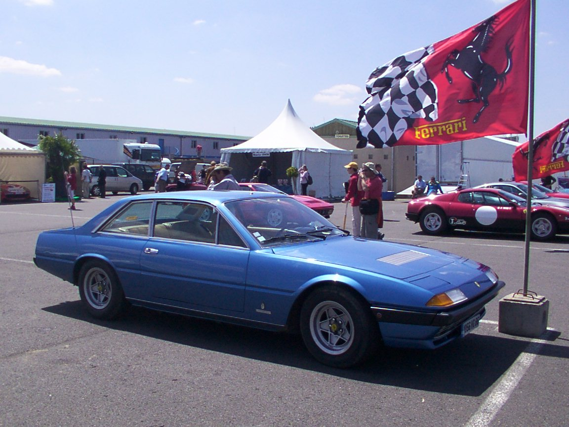 Une Ferrari 400 Automatic au rassemblement Sport & Collection sur le Circuit du Vigeant.